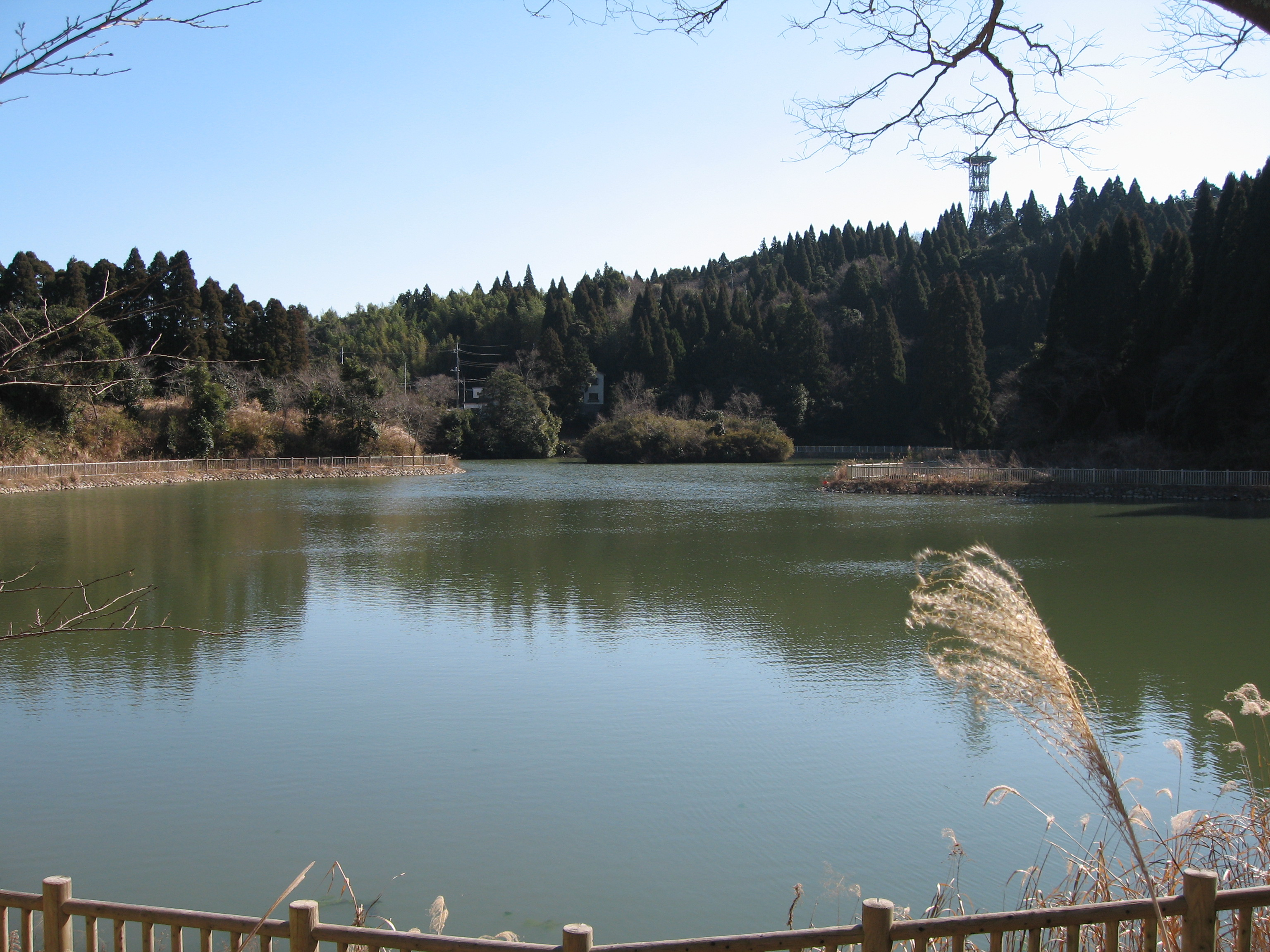 Douteiko Lake, Torami, Chiba, Japan, 洞庭湖（畔より）